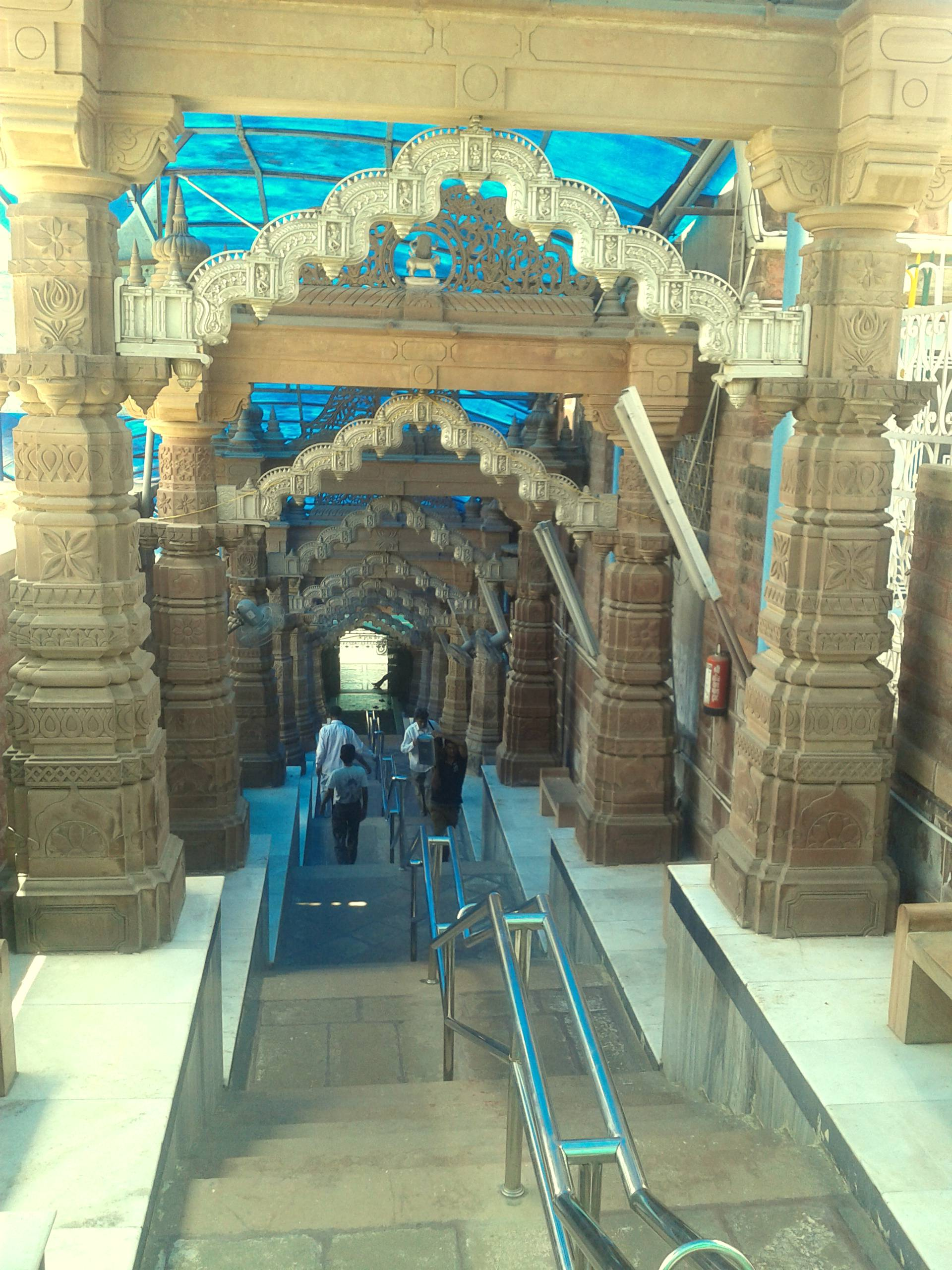 यह मंदिर बहुत ऊँचा है तथा ये फोटो सीढ़ियों से लिया गया है ।